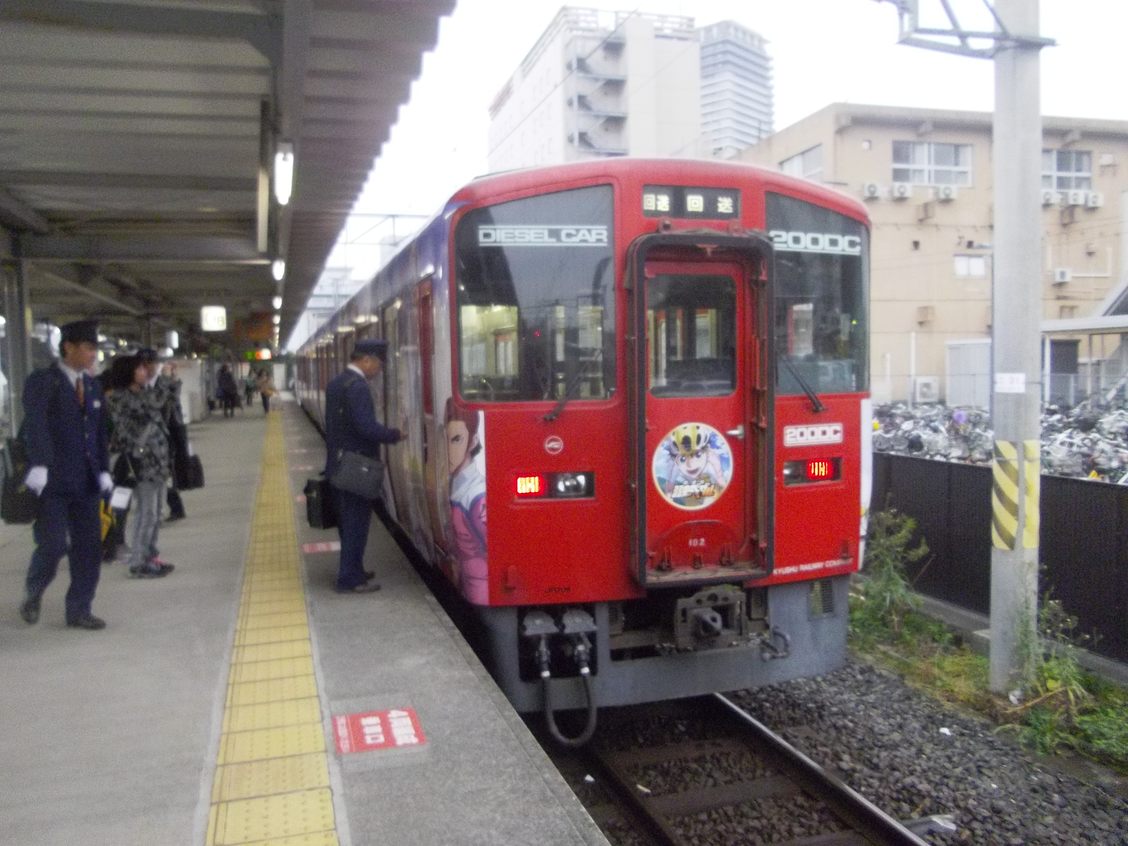 「弱虫ペダル」劇場版PR用ラッピング列車